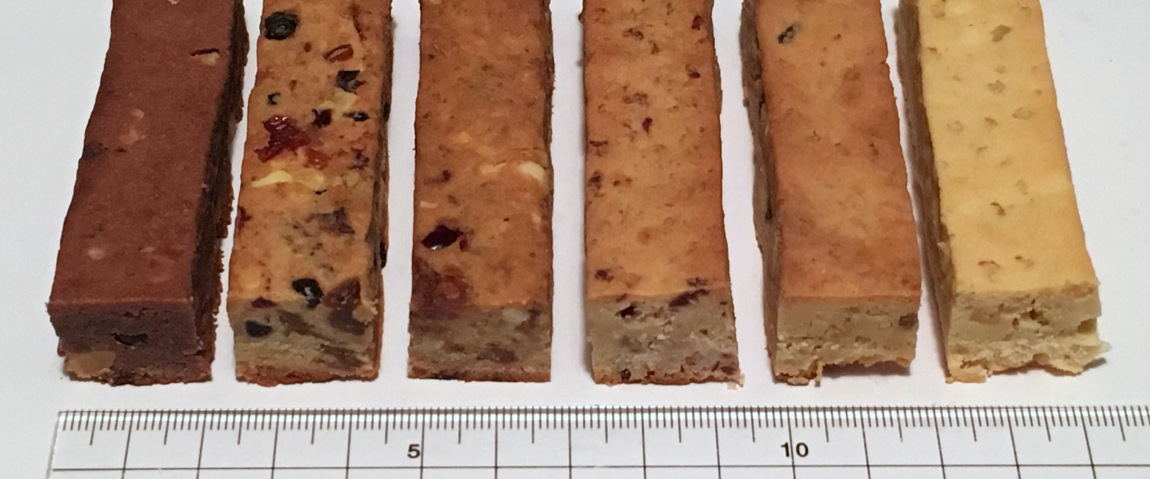 大塚製薬のソイジョイ。左から アーモンドチョコレート ブルーベリー ストロベリー クリスピー ミックスベリー クリスピー バナナ クリスピー ホワイトマカダミア